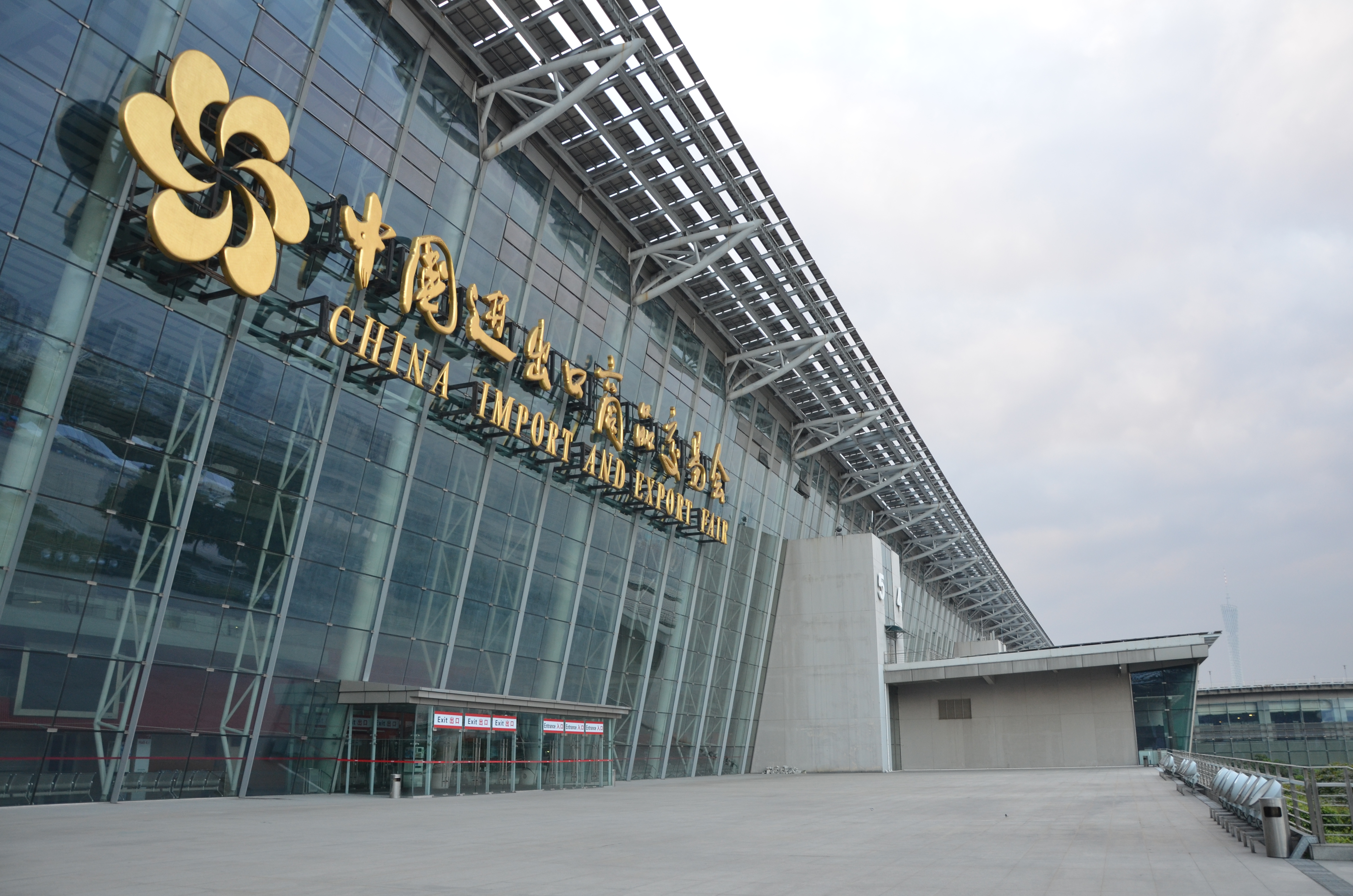 中國進出口商品交易會展館大門